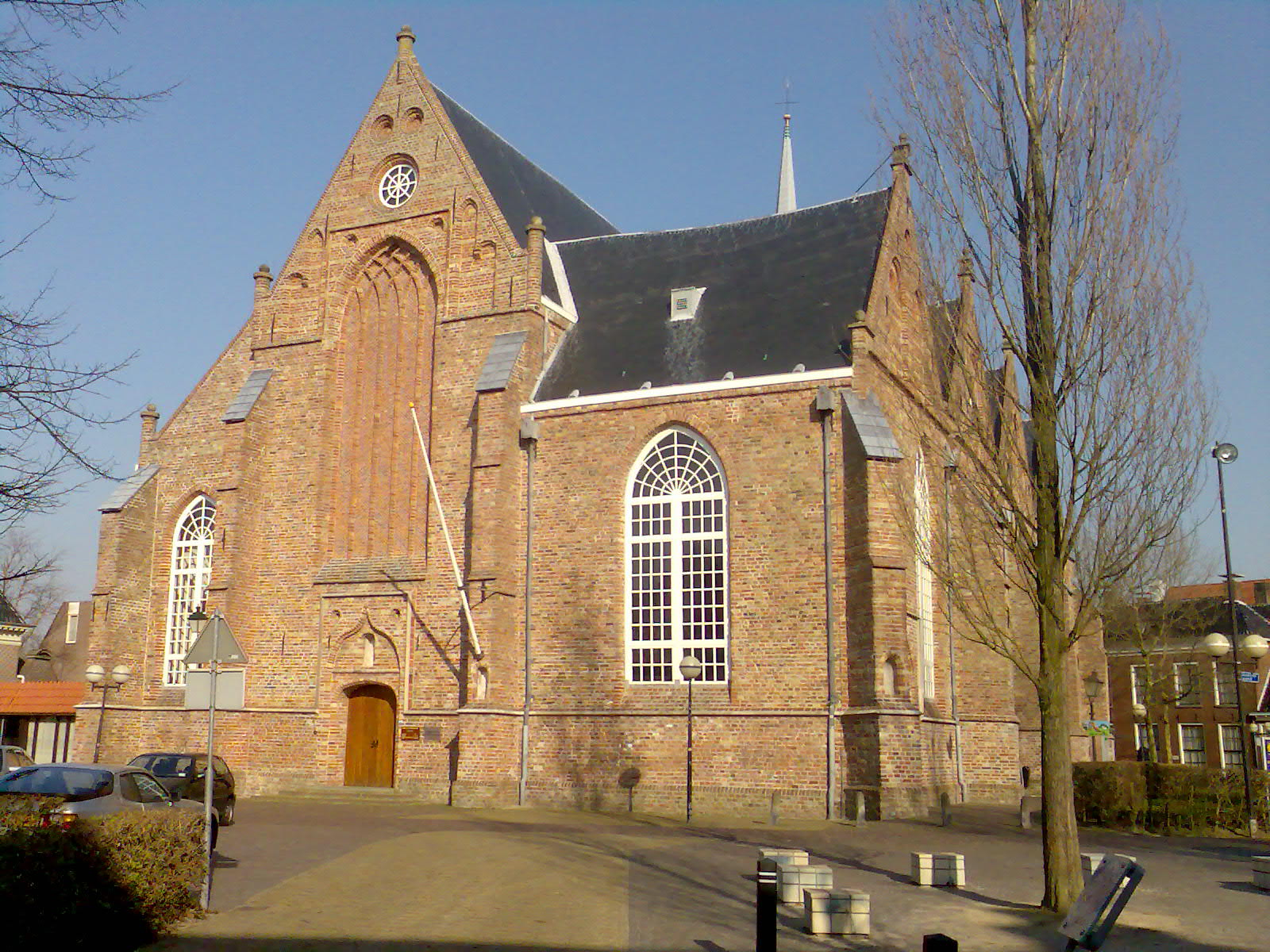 PD door eigen werk